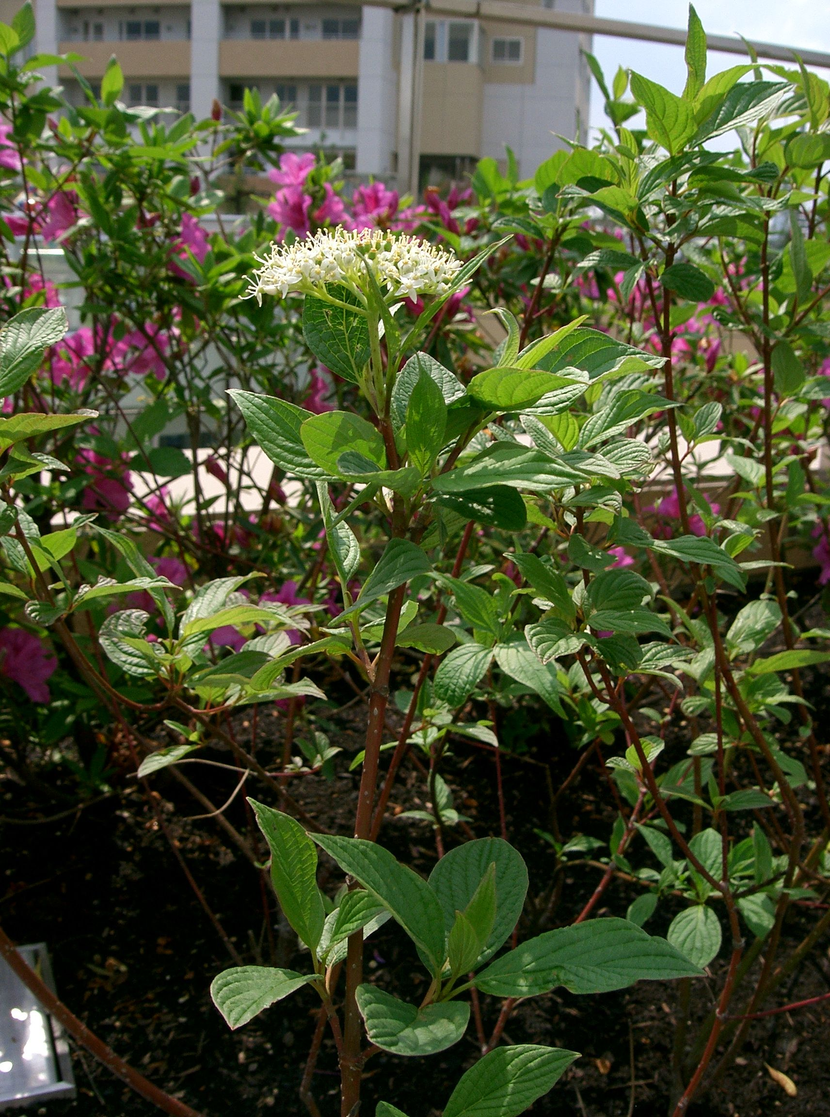 Cornus alba 'sibirica'